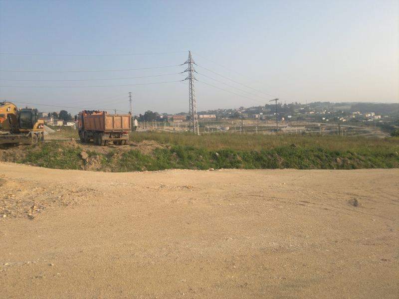 Ver título